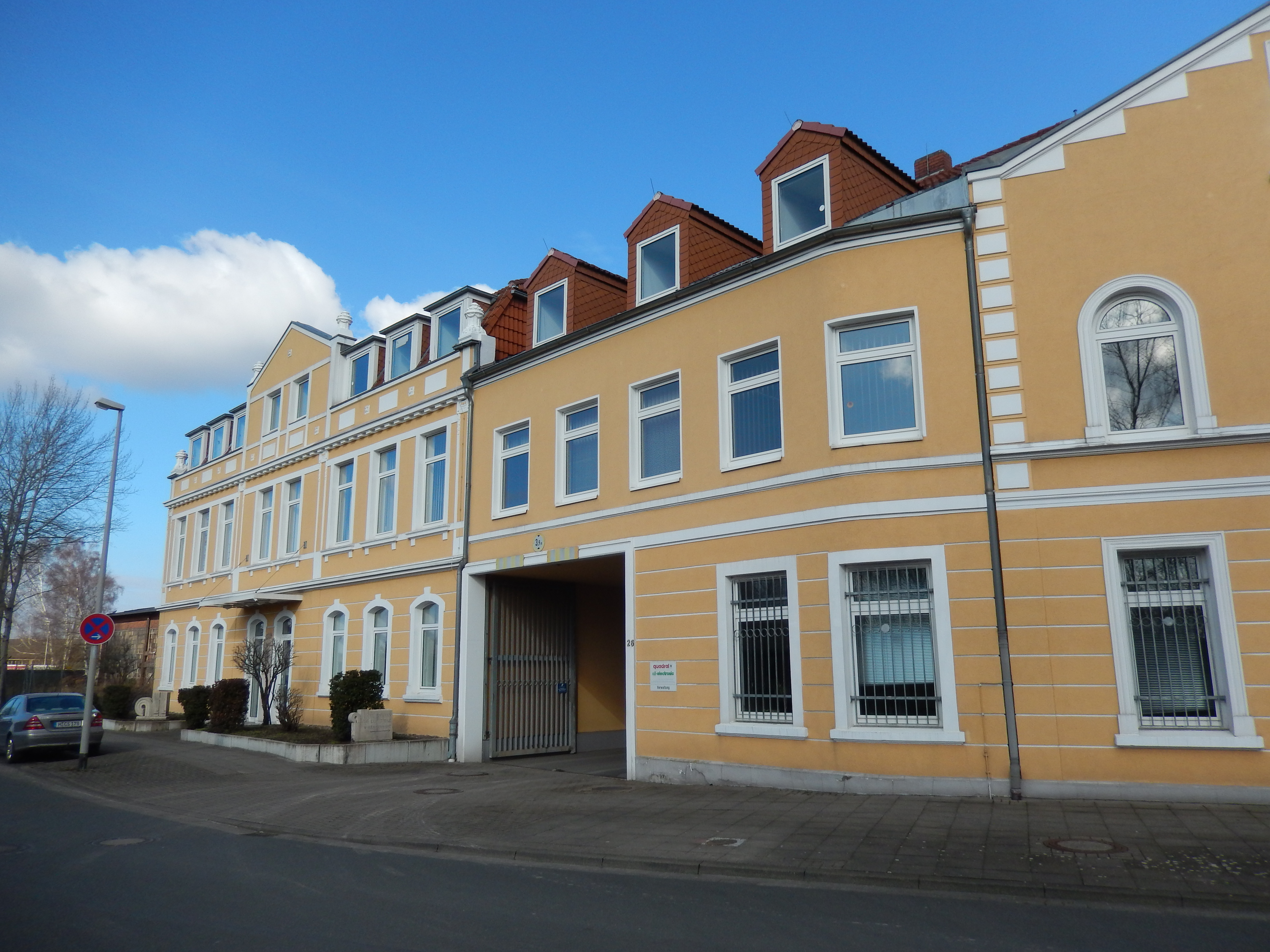 Sitz der Firma Quadral in Hannover